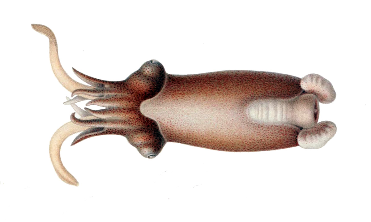 Spirula spirula